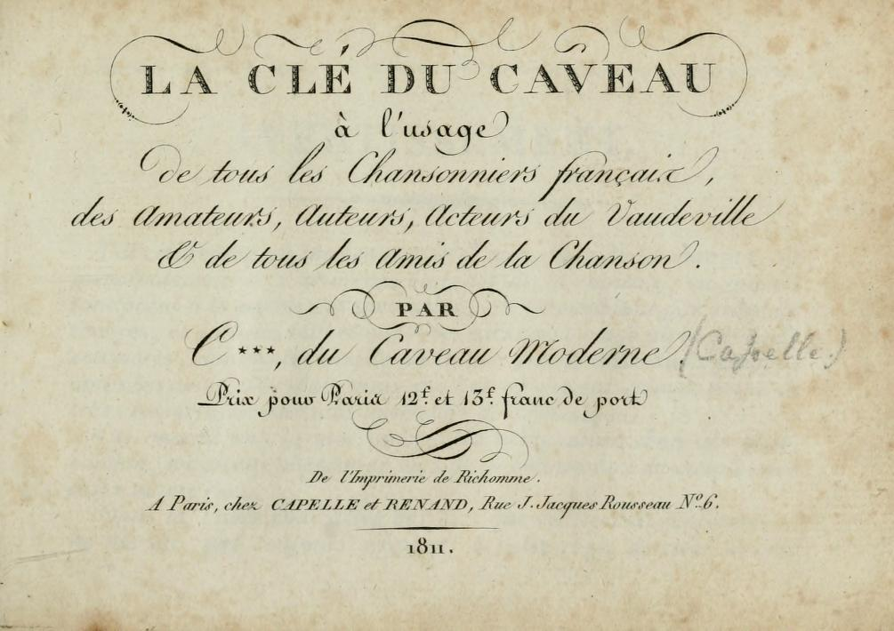 Page de titre du recueil de timbres "La clé du Caveau", édité en 1811.